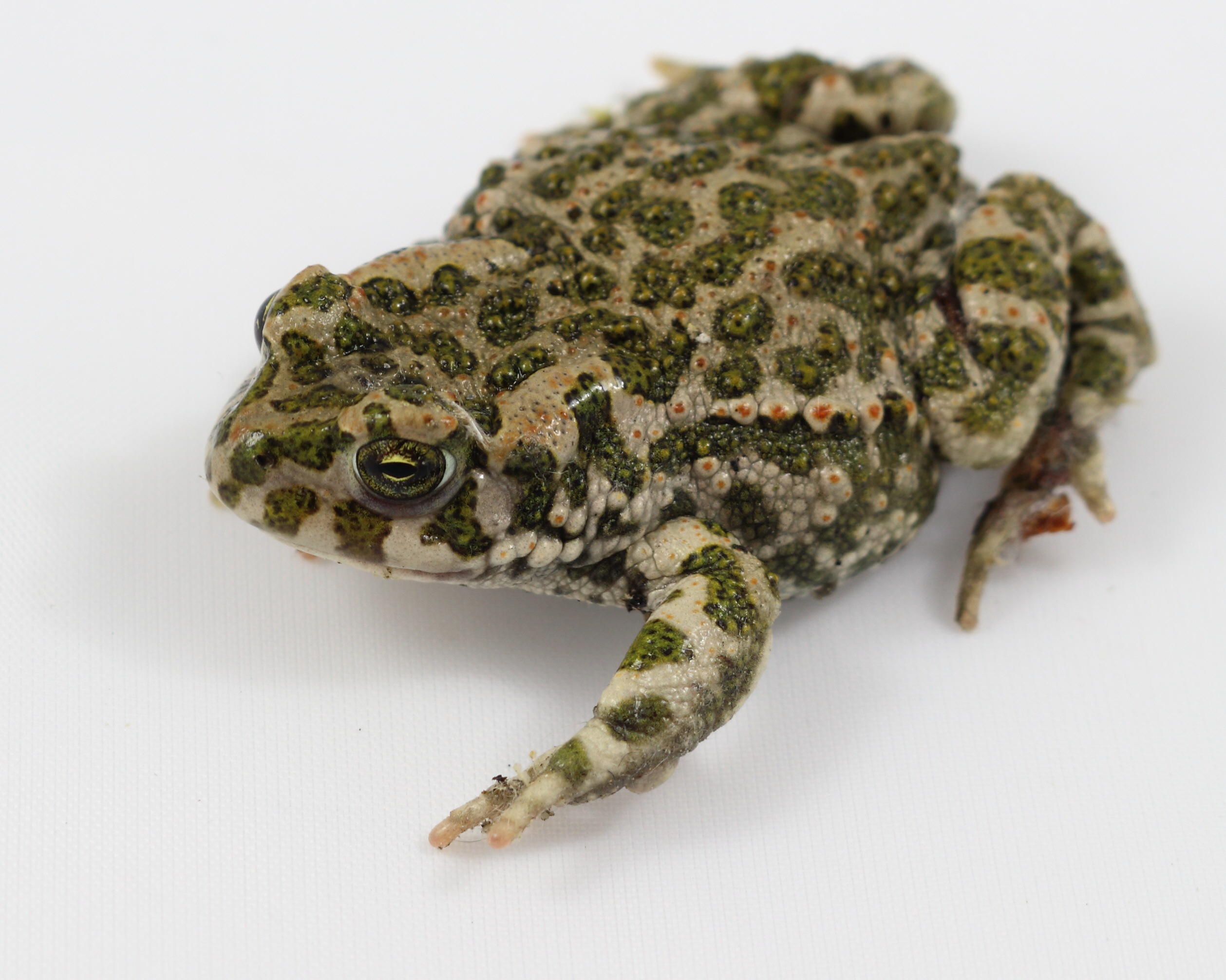 Wechselkröte Bufo viridis, vermutlich ein junges Weibchen, Körperlänge ca. 5 cm Die abgebildete Kröte wurde am 27. Mai 2014 von Franz Xaver und Fice auf WP:RBIO/B bestimmt The True toad shown here has been identified by Franz Xaver and Fice on WP:RBIO/B 2014, May 27th